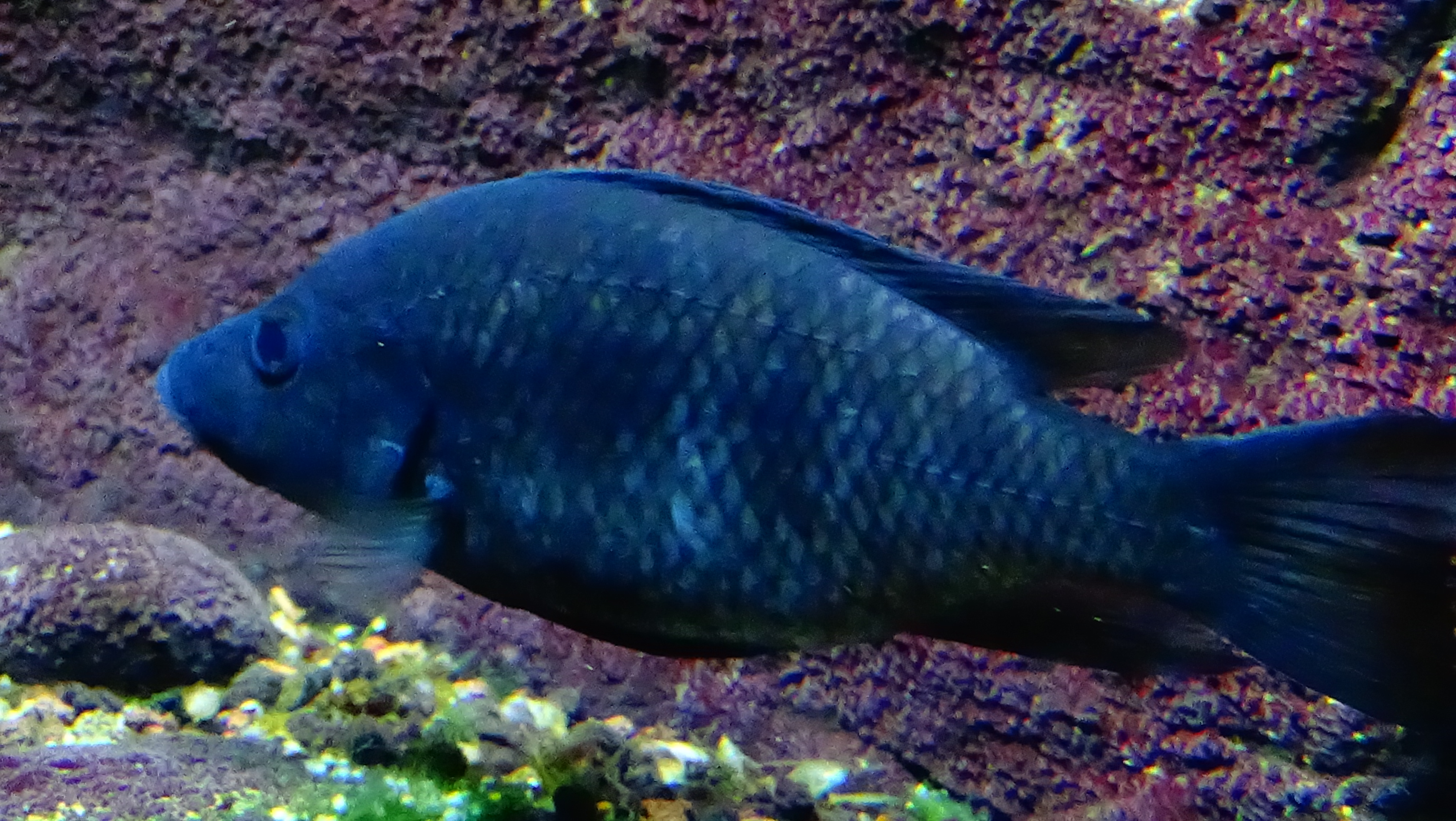 Stomatepia pindu - Adulte - Lac Barombi Mbo - Aquarium de la Porte Dorée Paris, ile France, France - 11/2014